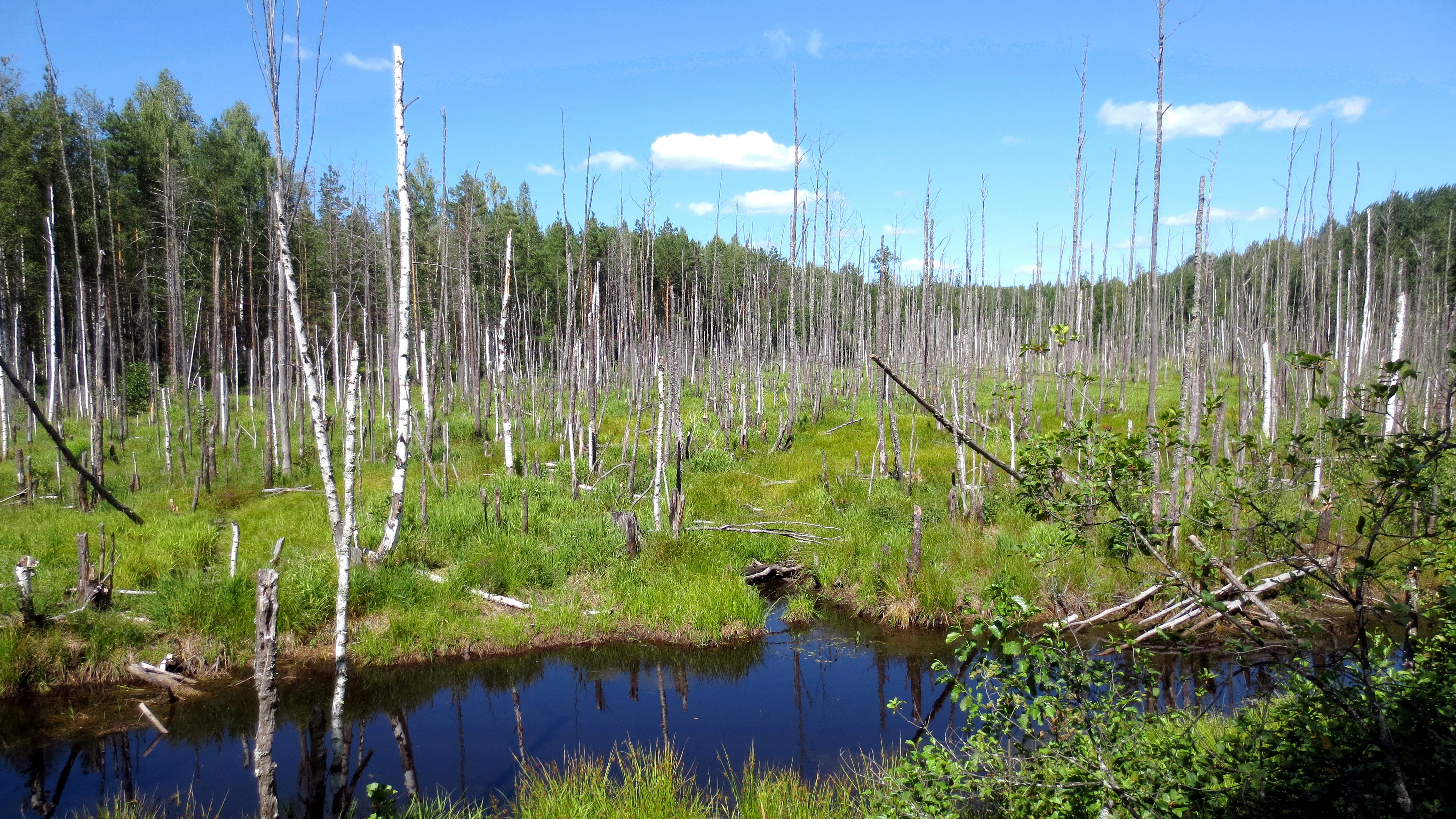 Керженский заповедник: Находится в 50 км на северо-восток от г. Нижнего Новгорода и расположен в Борском и Семеновском районах Нижегородской области на левом берегу реки Керженец, притока реки Волги,Семёновский район, Нижегородская область This image is related to the protected area of Russia number 5200494